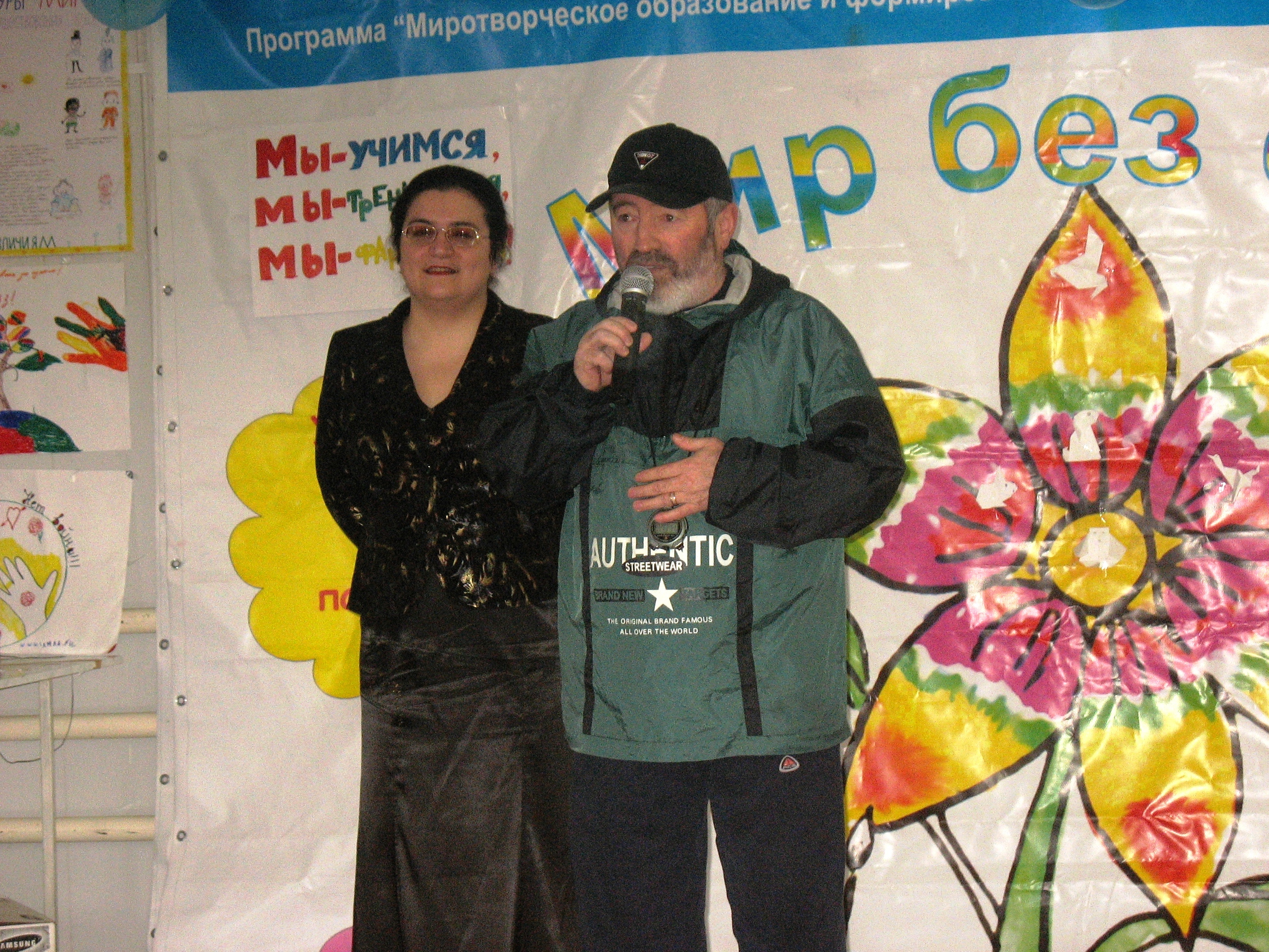 Программа толерантности в Халимбек-ауле в 2008 году